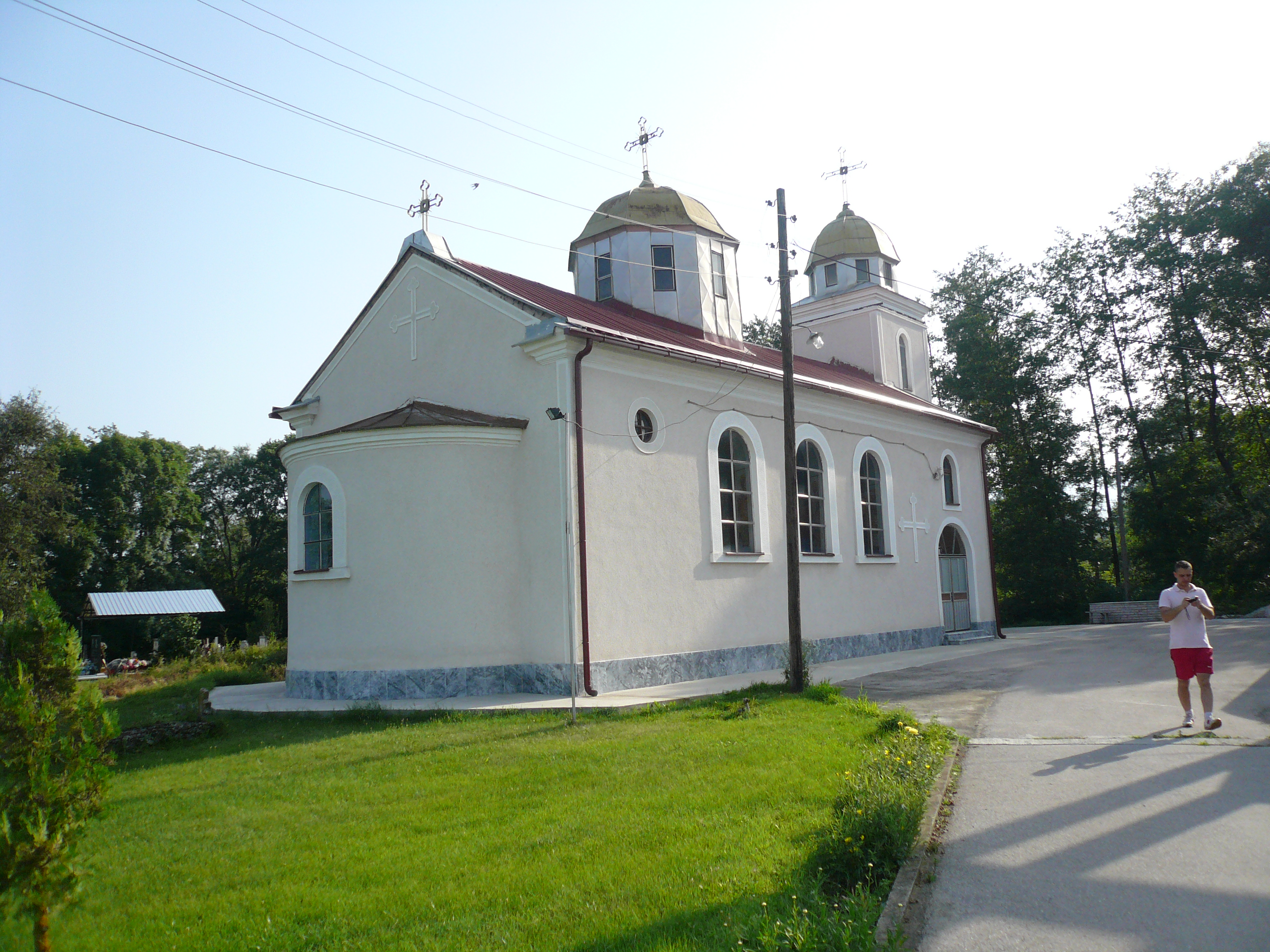 Църквата "Свети Атанасий" в Радиовце, Македония.